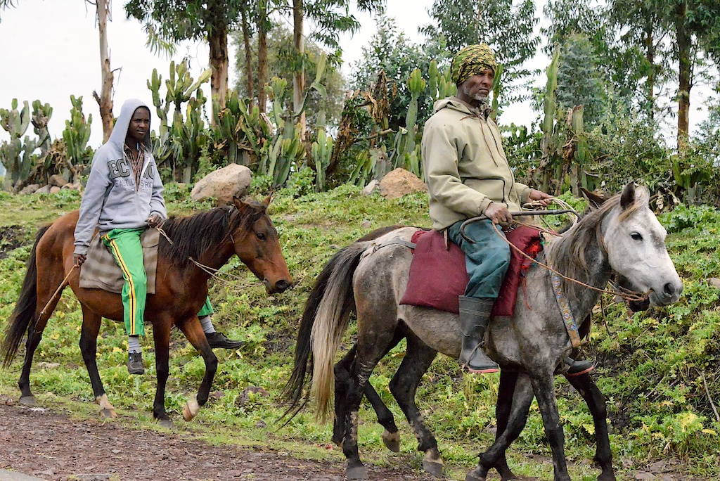 Oromo Men, Ethiopia